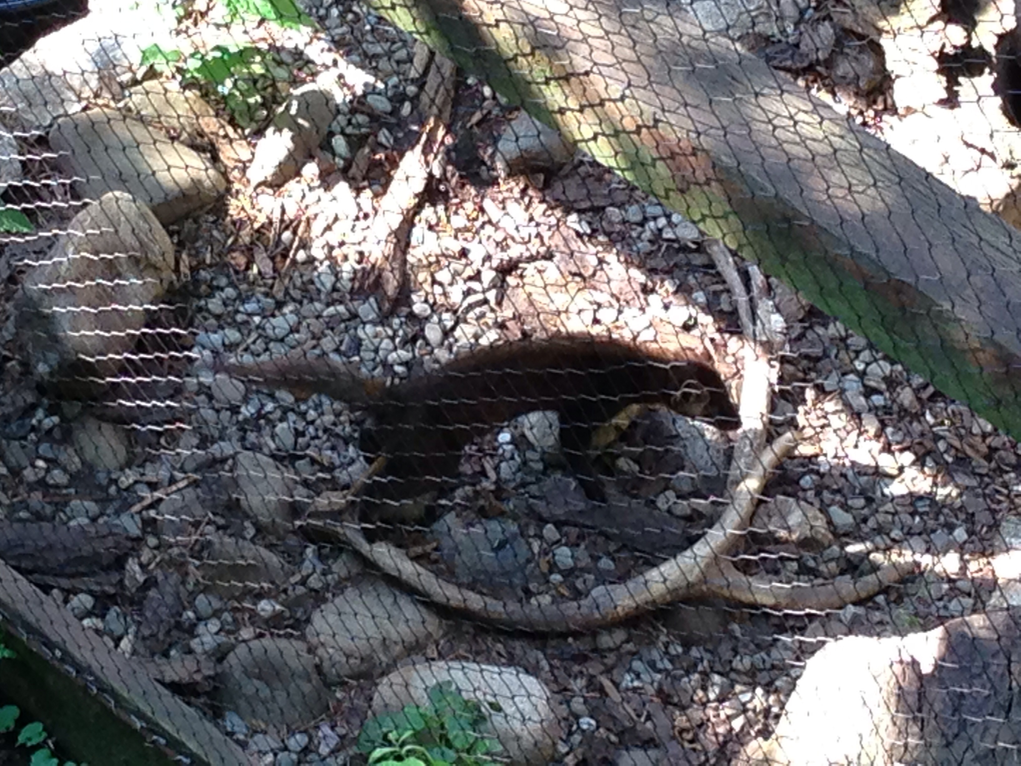 ZooAmerica Marten